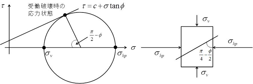 ランキンの受働土圧状態